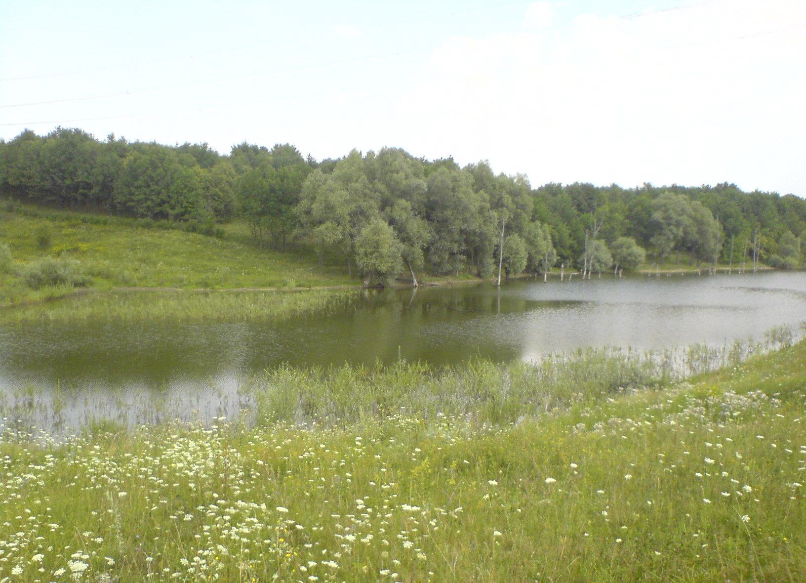 Пруд на хуторе Медвежьем недалеко от города Люботина в Харьковской области